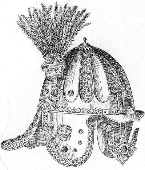 Ilustracja do Encyklopedii staropolskiej T.2 302 - hełm husarski (kapalin)